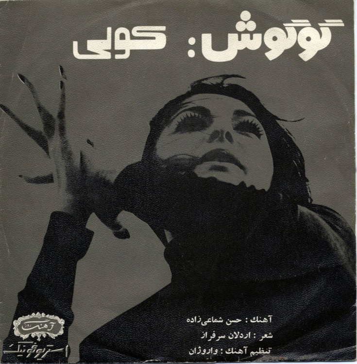 کولی